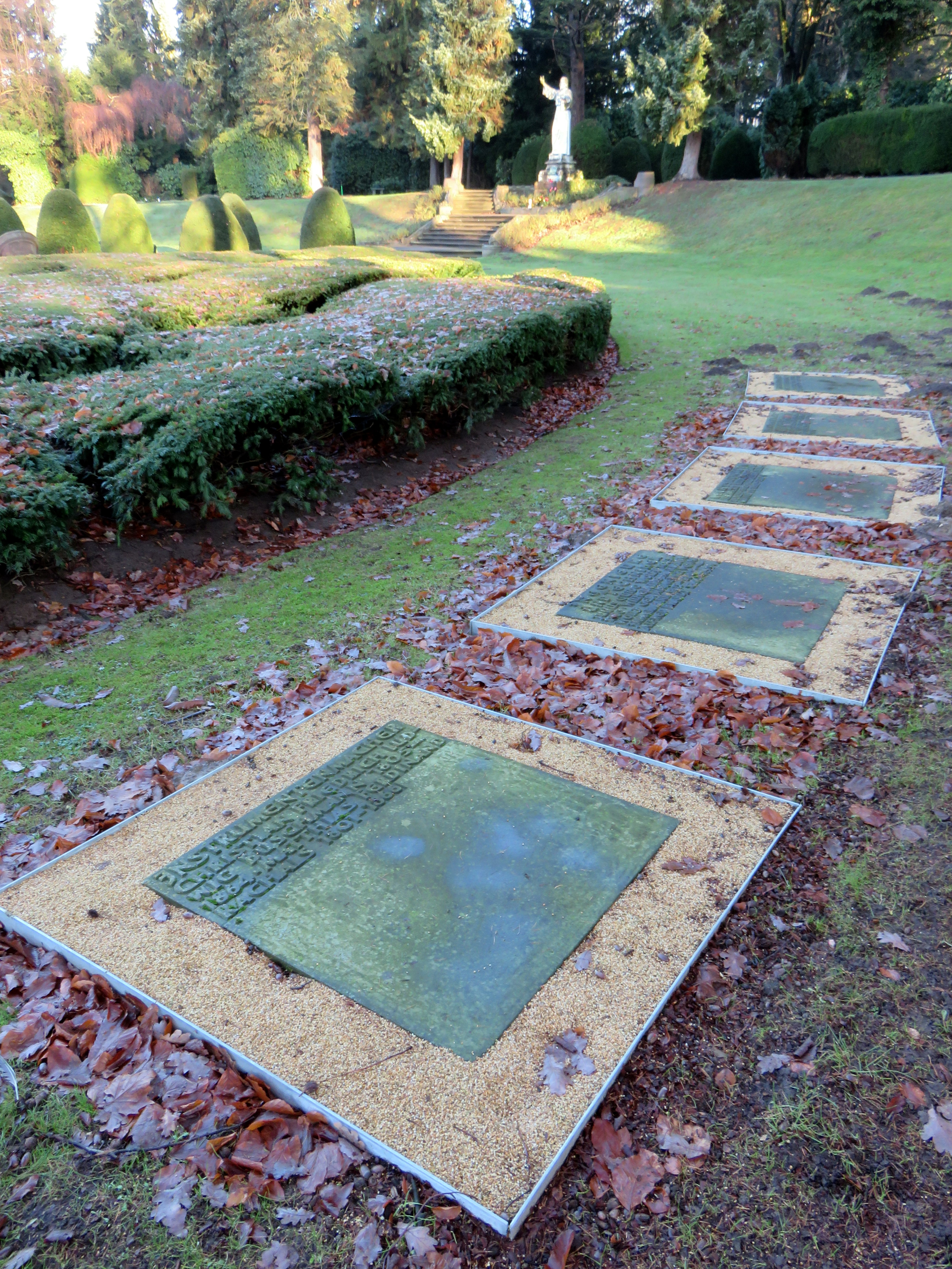 Sammelgrabmal Instrumentenmacher im Bereich des Althamburgischen Gedächtnisfriedhofs auf dem Hamburger Friedhof Ohlsdorf zu Ehren von Christian Friedrich Ludwig Buschmann und Matthias Ferdinand Rachals.